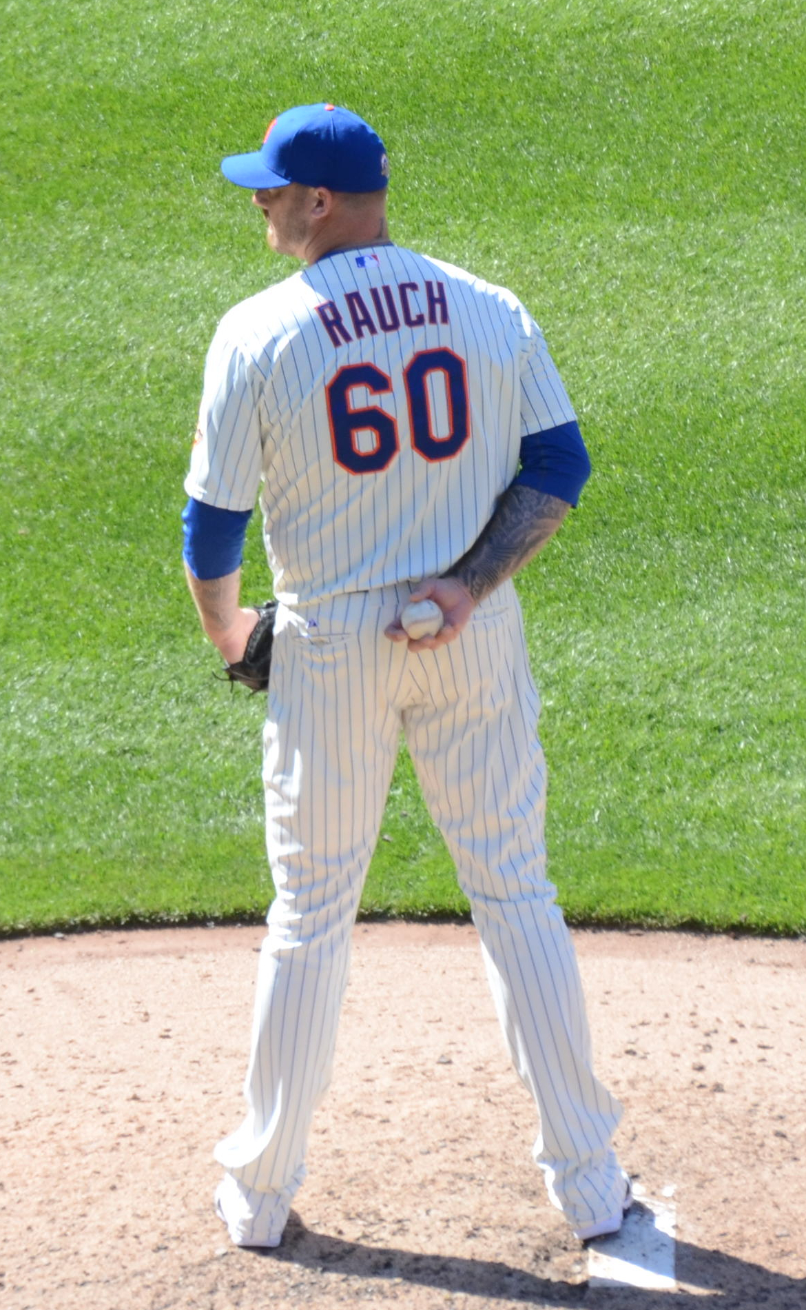 Jon Rauch